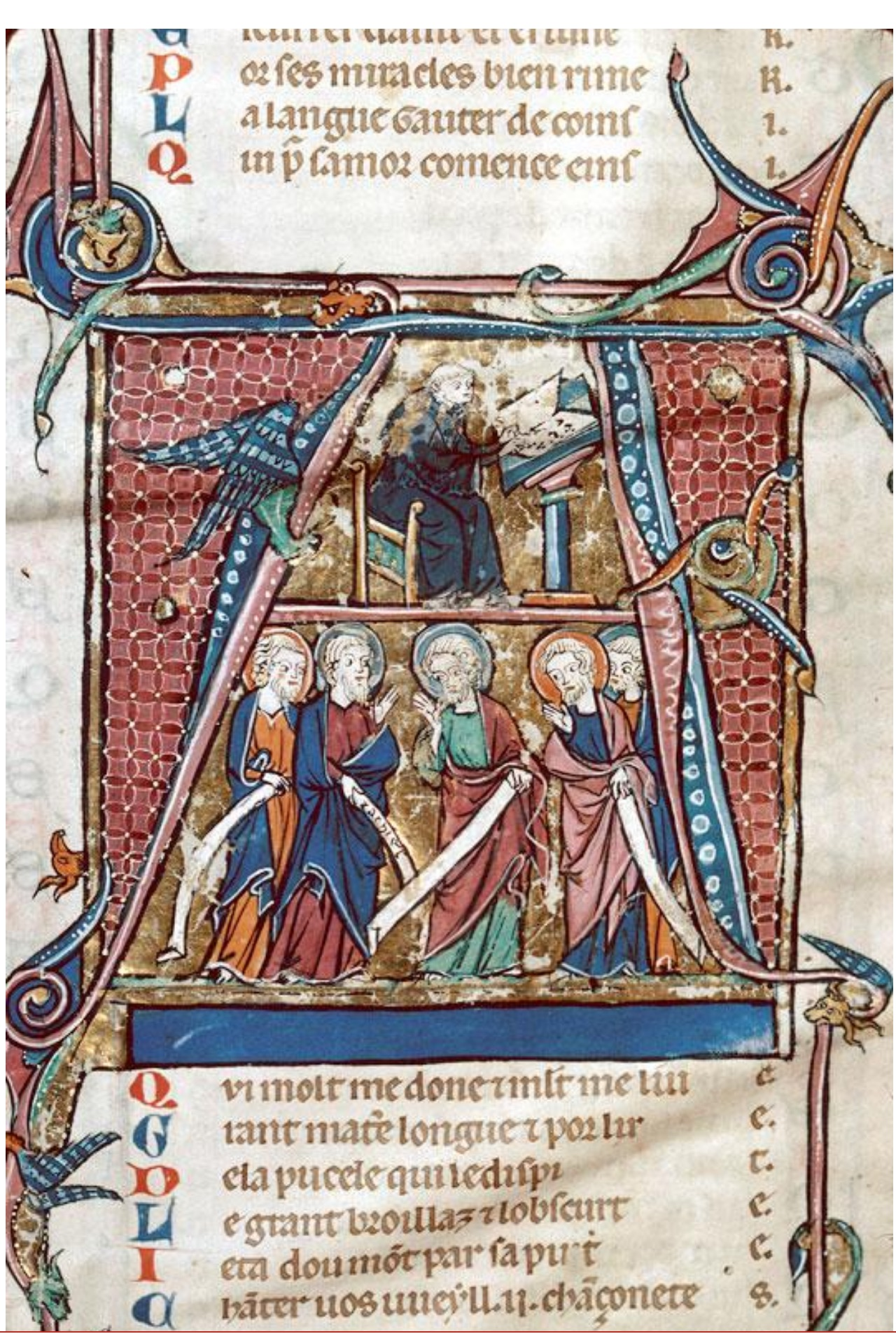 F002v-Chasse à la biche - Autruche